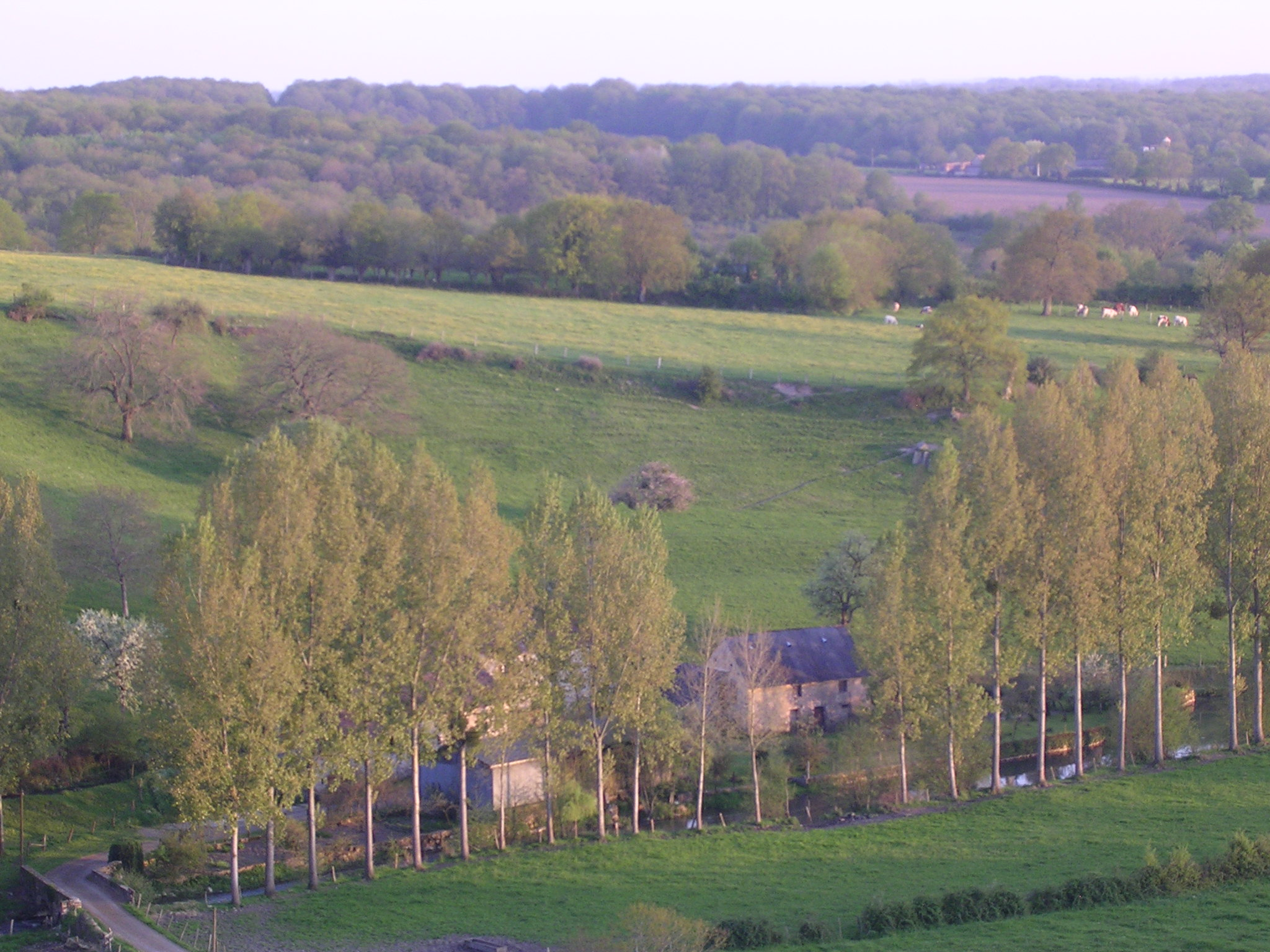 La rivière l'Erve aux "Choiseaux" et la forêt de la Charnie à sainte-Suzanne (Mayenne - France)